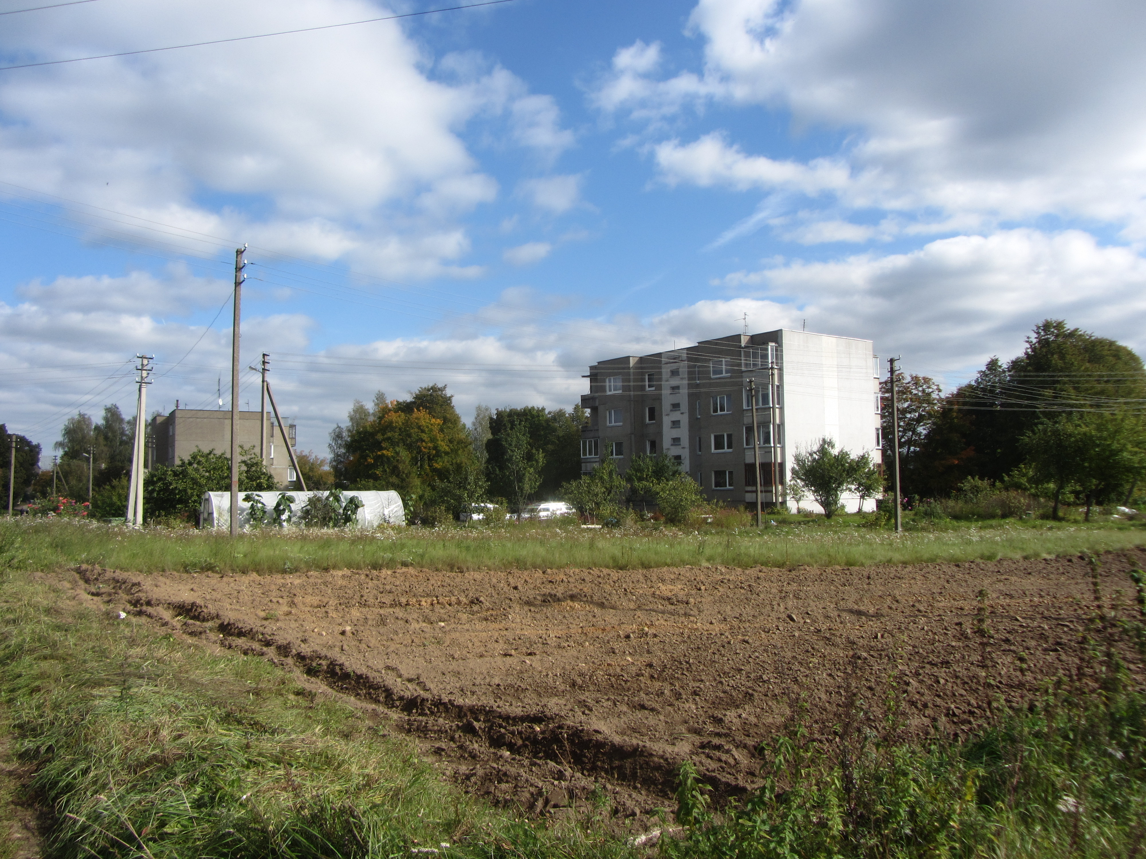 Rūdiškės, Lithuania